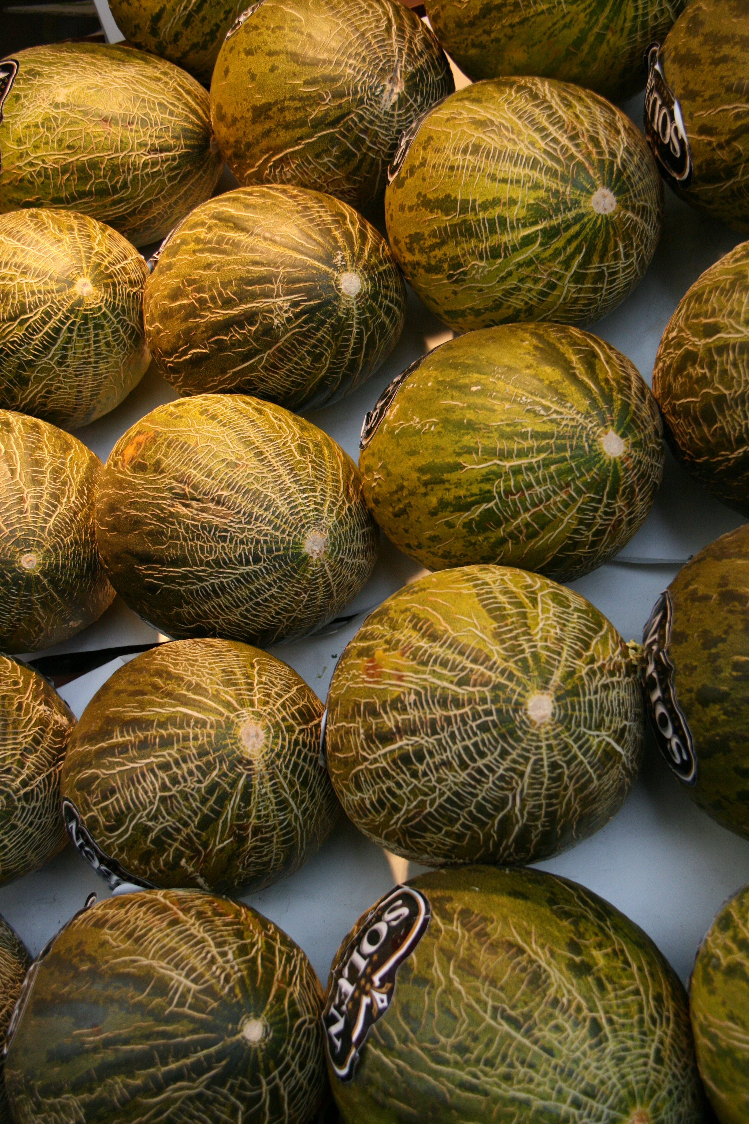 Melones piel de sapo